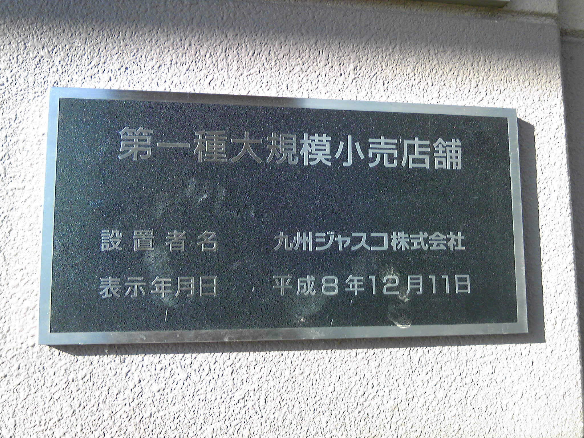 イオン唐津SCの大規模小売店舗表示板（佐賀県唐津市）